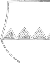 Pot - Culture d'Artenac - 2400 av. JC